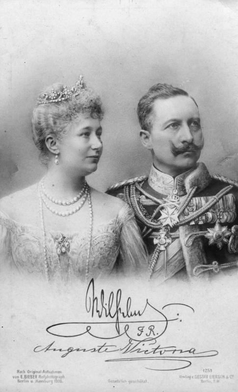 [Postkarte mit Reproduktionen eigenhändiger Unterschriften:] Wilhelm I.R., Auguste Victora Nach Original-Aufnahmen von E. Bieber Hofphotograph Berlin u. Hamburg 1906 1250 Verlag v. Gustav Liersch & Co., Berlin, S.W.